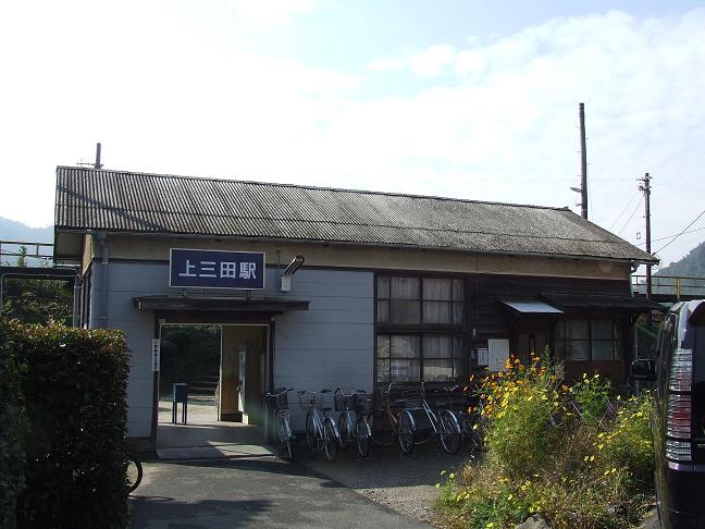 JR西日本芸備線上三田駅の駅舎